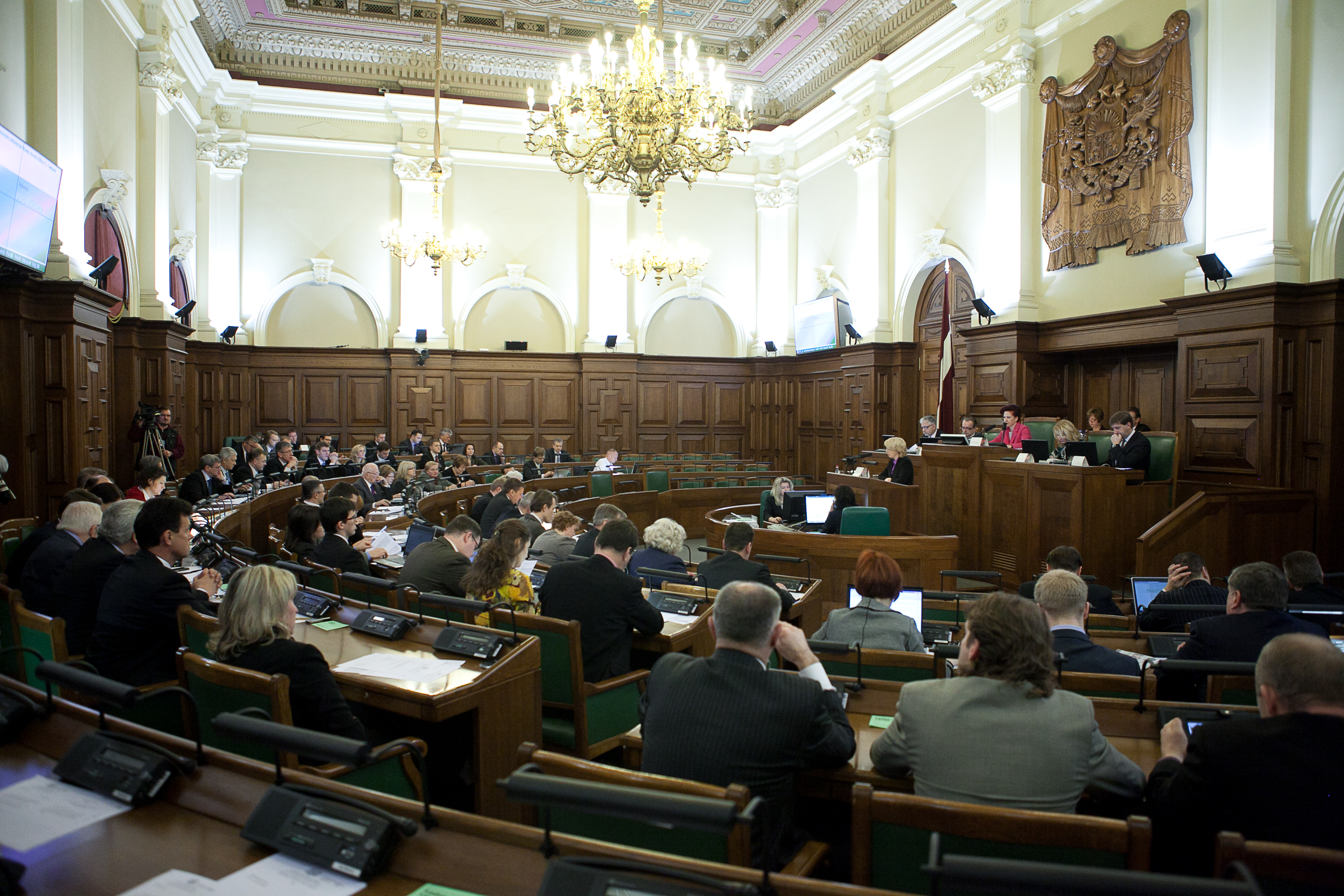 2012.gada 6.decembris. Darbs Saeimas sēdē. Foto: Ernests Dinka, Saeimas Kanceleja